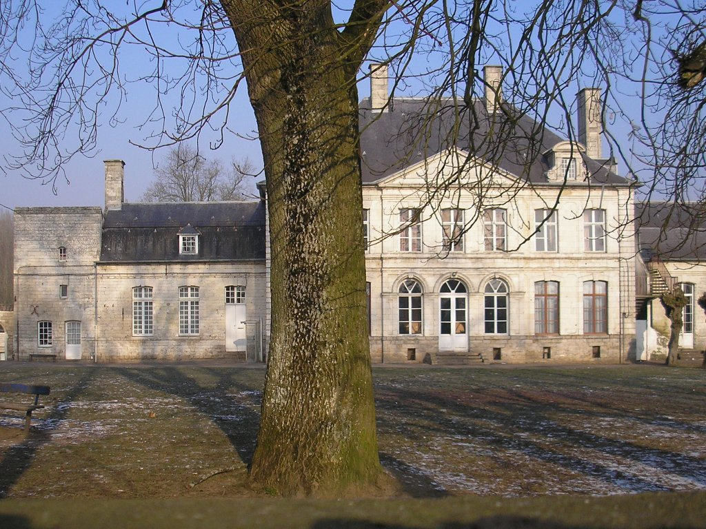 Le château de Duisans (Pas-de-Calais) prise par moi-même le 28 janvier 2006.